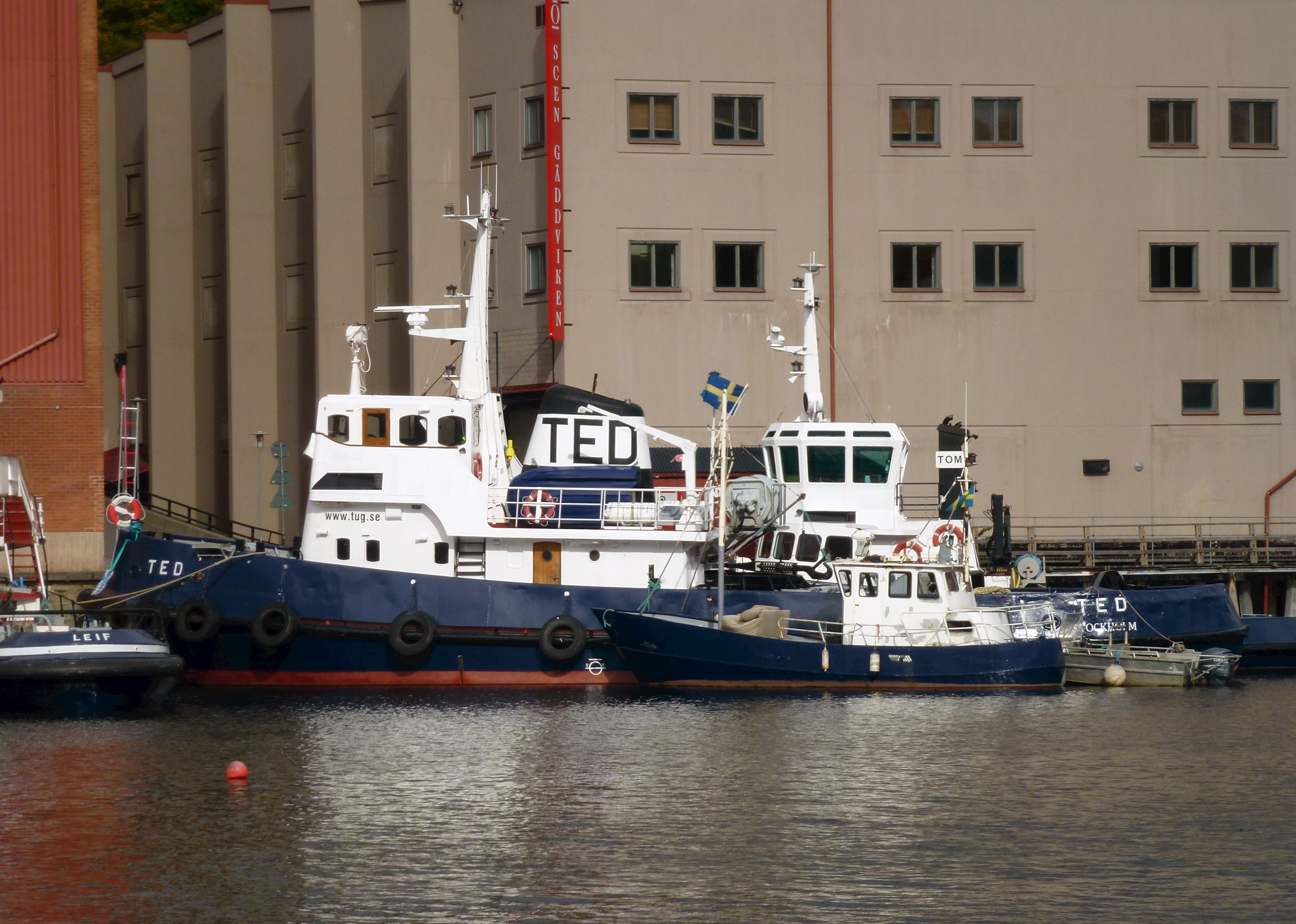 Bogserbåten TED och TOM i Gäddviken, i bakgrunden syns betongmagasinet som uppfördes på 1940-talet.